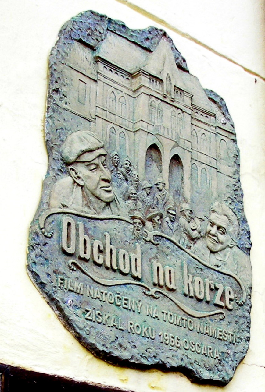 Sabinov starobylé bývalé slobodné kráľovské mesto na Slovensku. Dnes okresné mesto v regióne Šariš. Pamätná tabuľa na nakrúcanie filmu Obchod na korze, ktorý v roku 1966 získal americkú filmovú cenu Oskara.